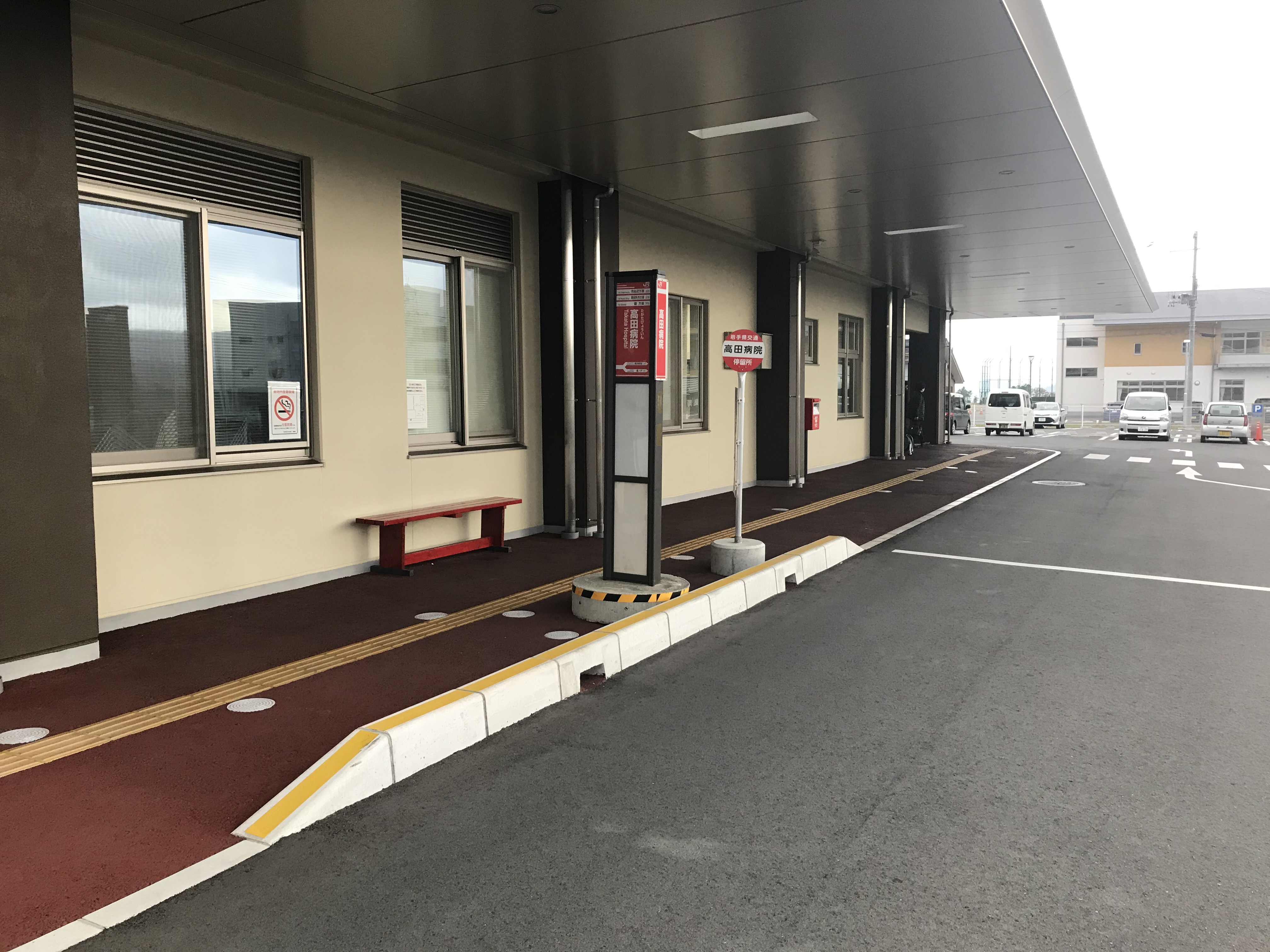 BRT大船渡線 高田病院前駅